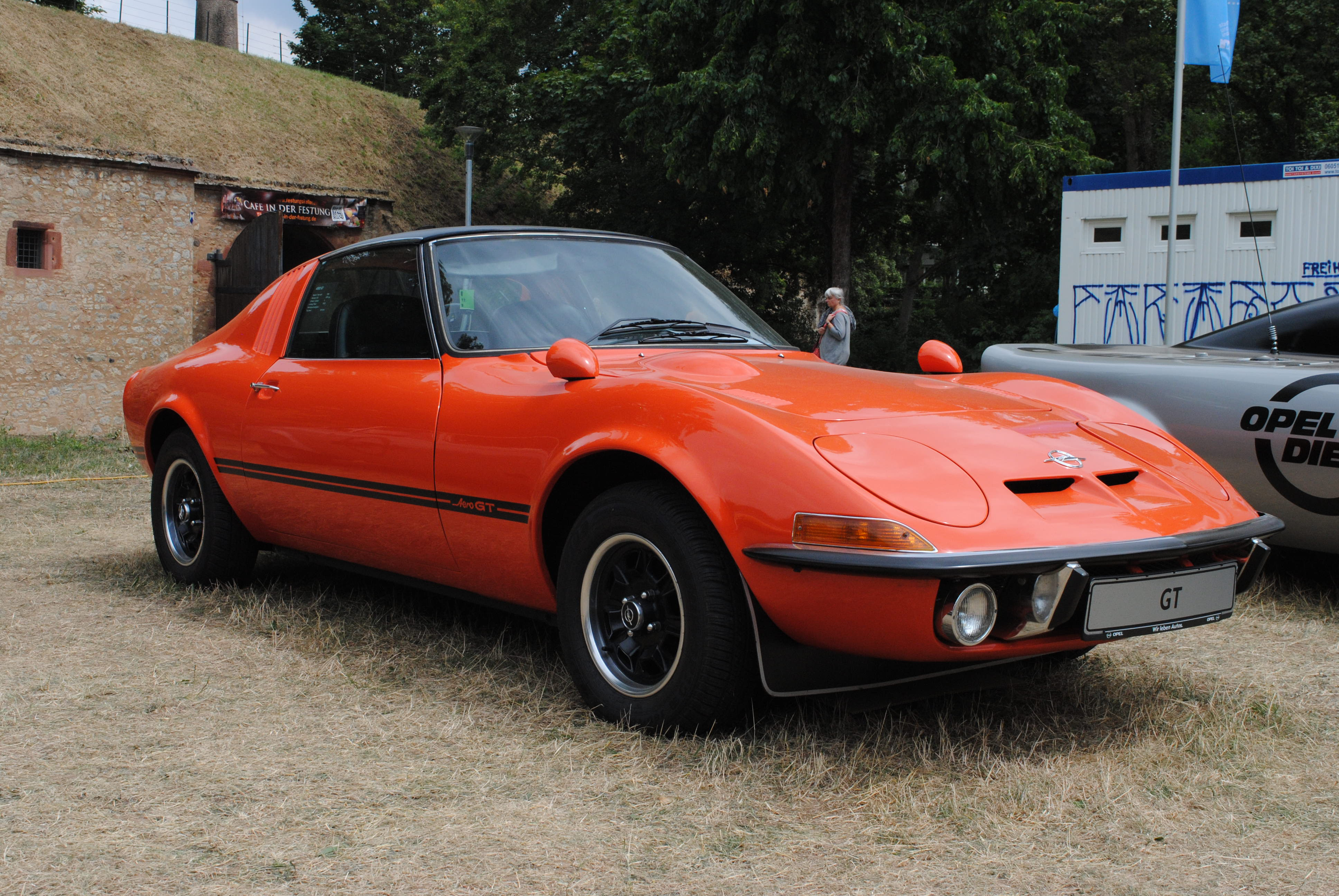 Opel Aero GT, Bj. 1969, auf dem Klassikertreffen Rüsselsheim 2018. Dieser Prototyp mit Targadach auf Basis des Opel GT wurde bei Fissore, ein weiterer bei Michelotti gebaut.